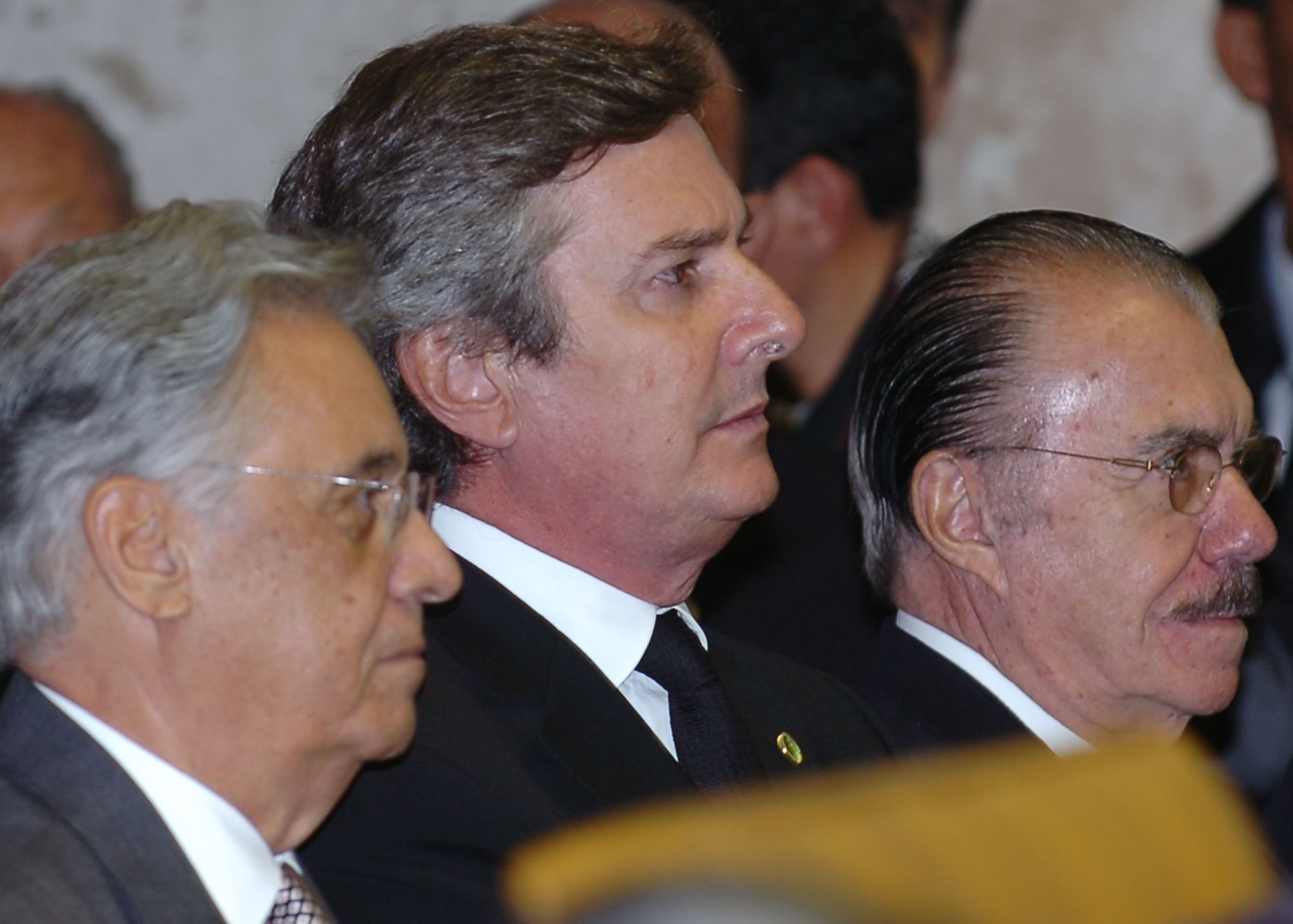 Os ex-presidentes Fernando Henrique Cardoso, Fernando Collor e José Sarney participam da cerimônia de posse do presidente do STF, ministro Gilmar Mendes.